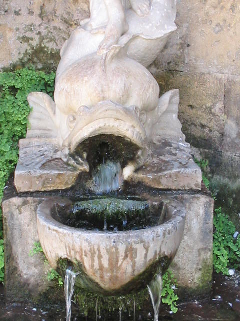 Scorcio in pietra di "Billiemi" della Fontana Grande 1879. Sicilianu: Scorcio in pietra di "Billiemi" della Fontana Grande 1879.